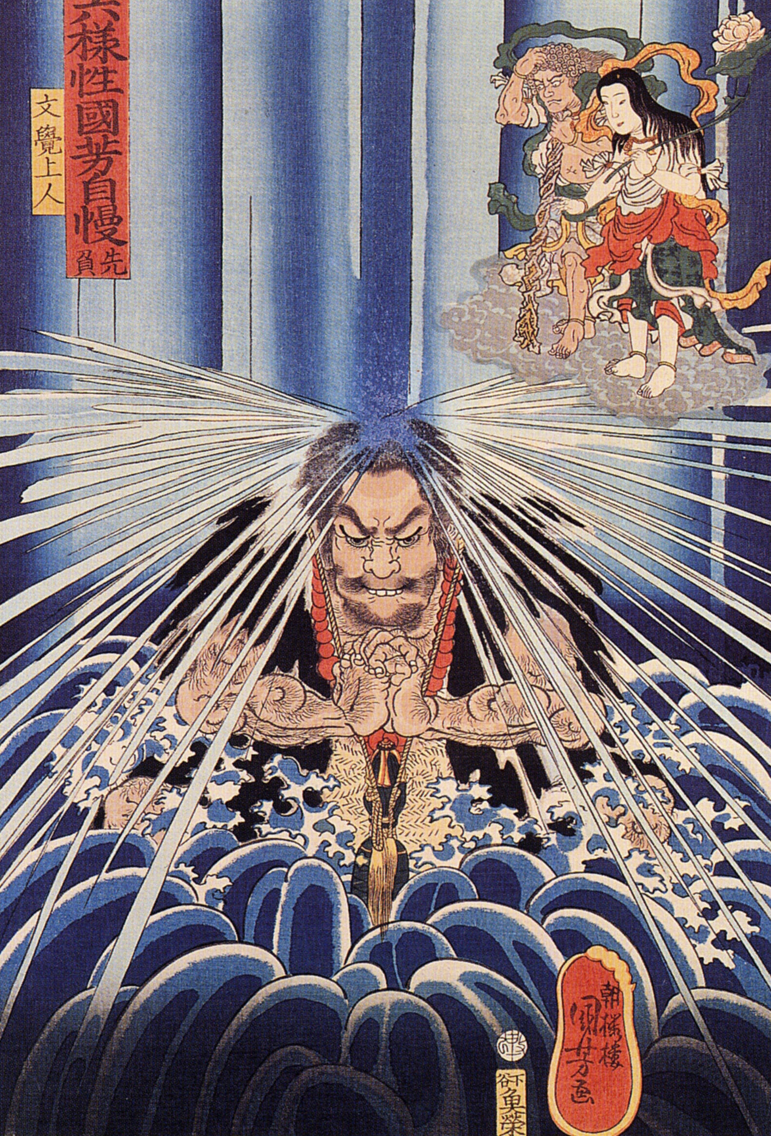 朝桜楼國芳画「六様性国芳自慢先負 文覚上人」、錦絵